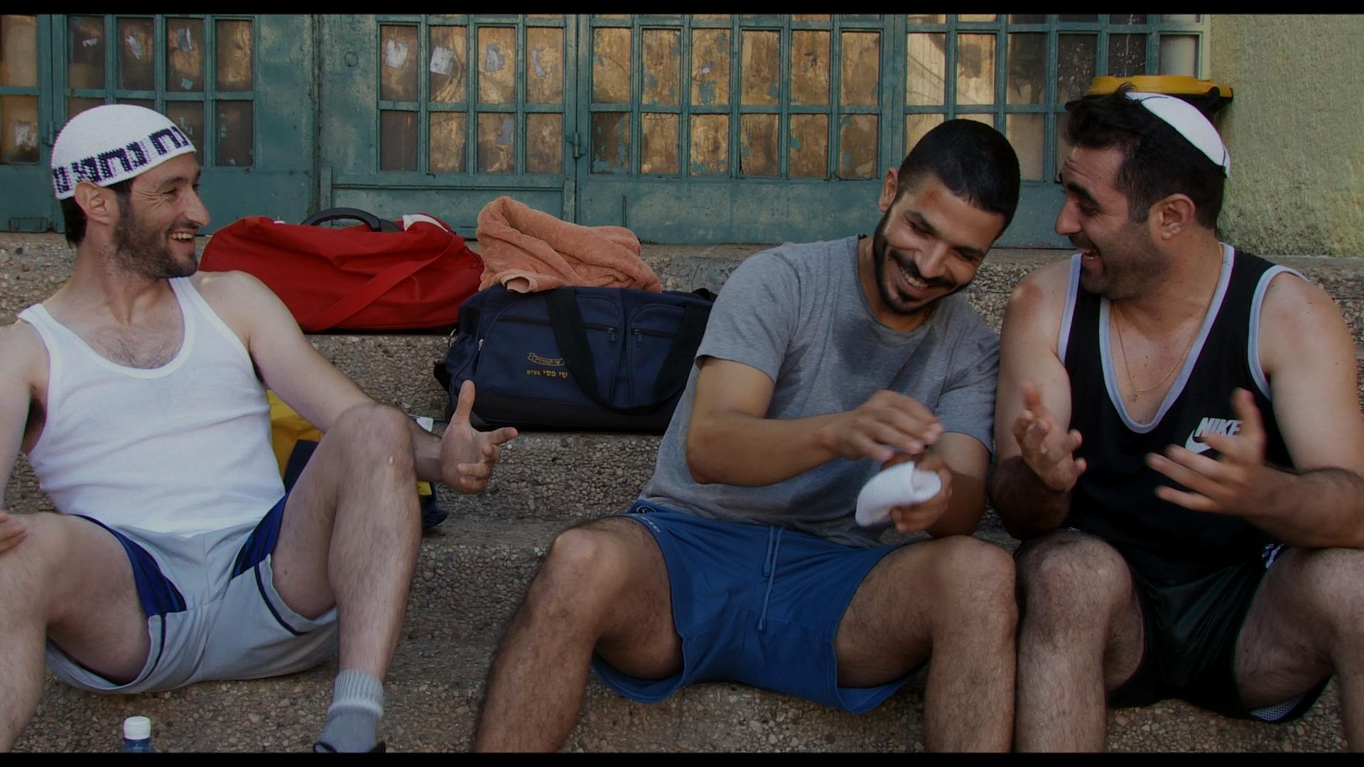 רועי אסף, גל פרידמן ואיציק גולן בסרט המשגיחים